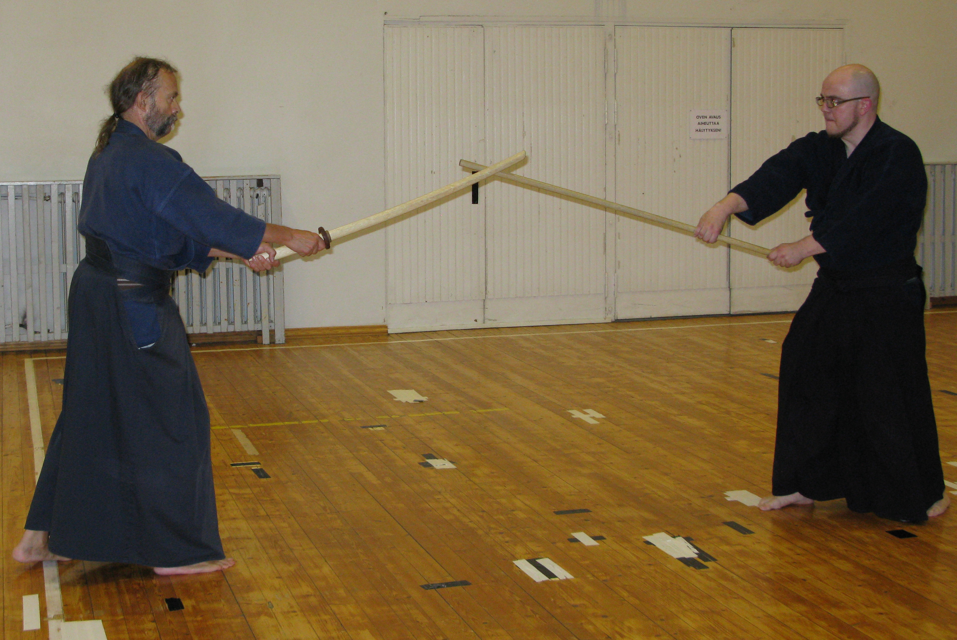 Old Japanese Martial art called Jodo. Technique: Awase - standby posture / kuva Japanilaisen kamppailulajin Jodon tekniikka, Awase valmiusasento